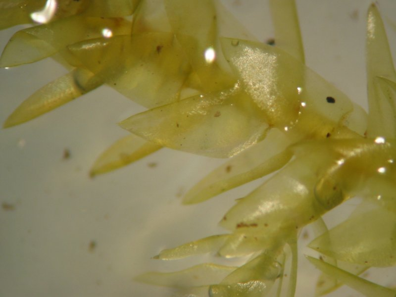 Spitzblättriges Spießmoos Calliergonella cuspidata, Rostock